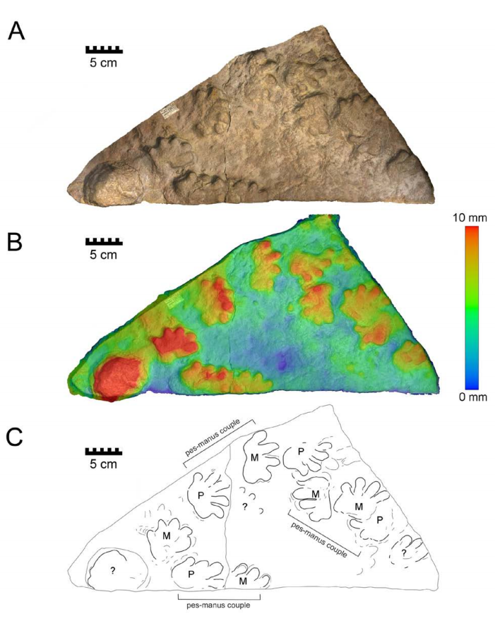 Limnopus-fodaftryk i karbonisk sandsten fra Mestersvig